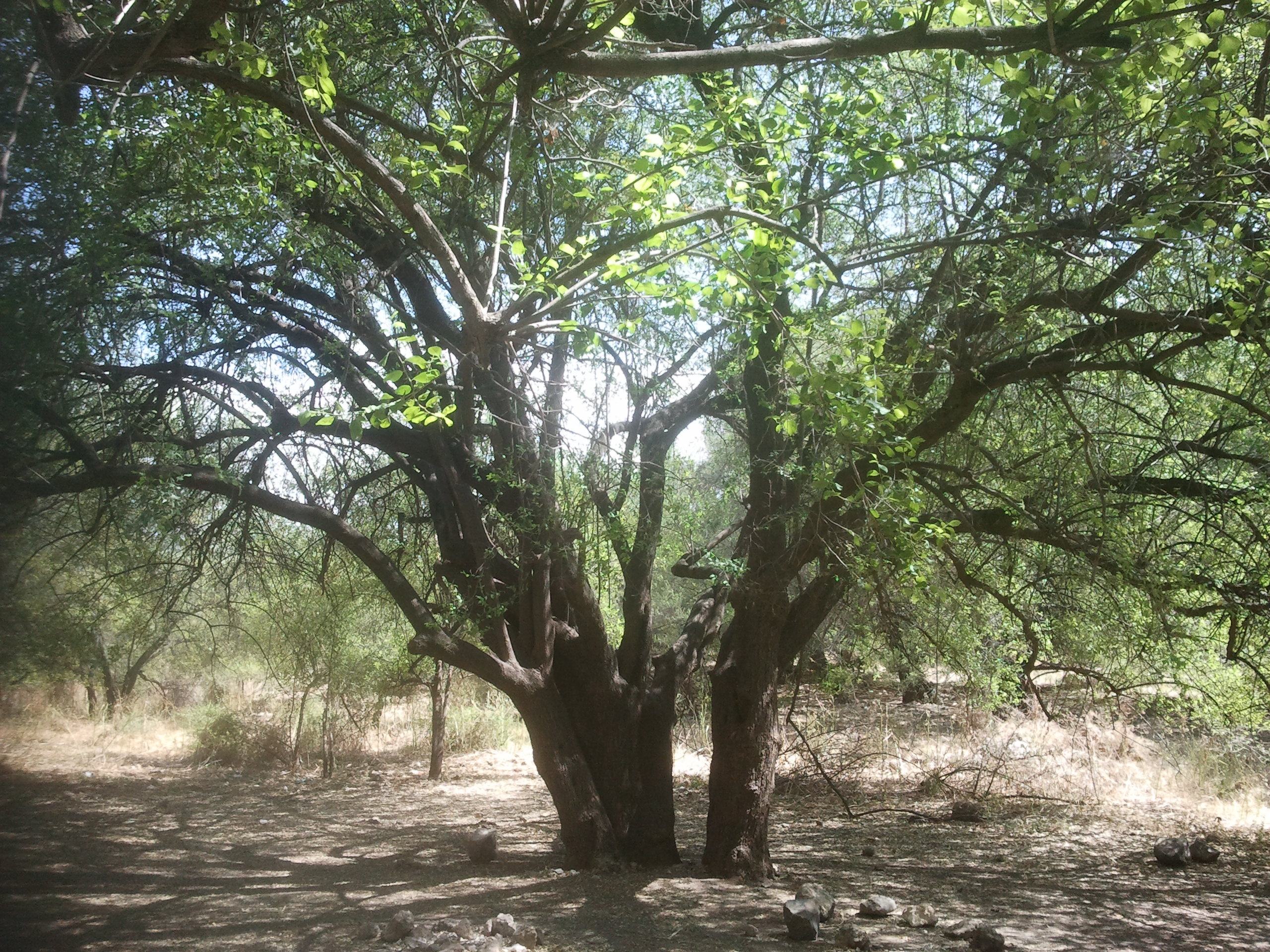 עצי שיזף מצוי בחורשה ליד עין חוקוק בגליל